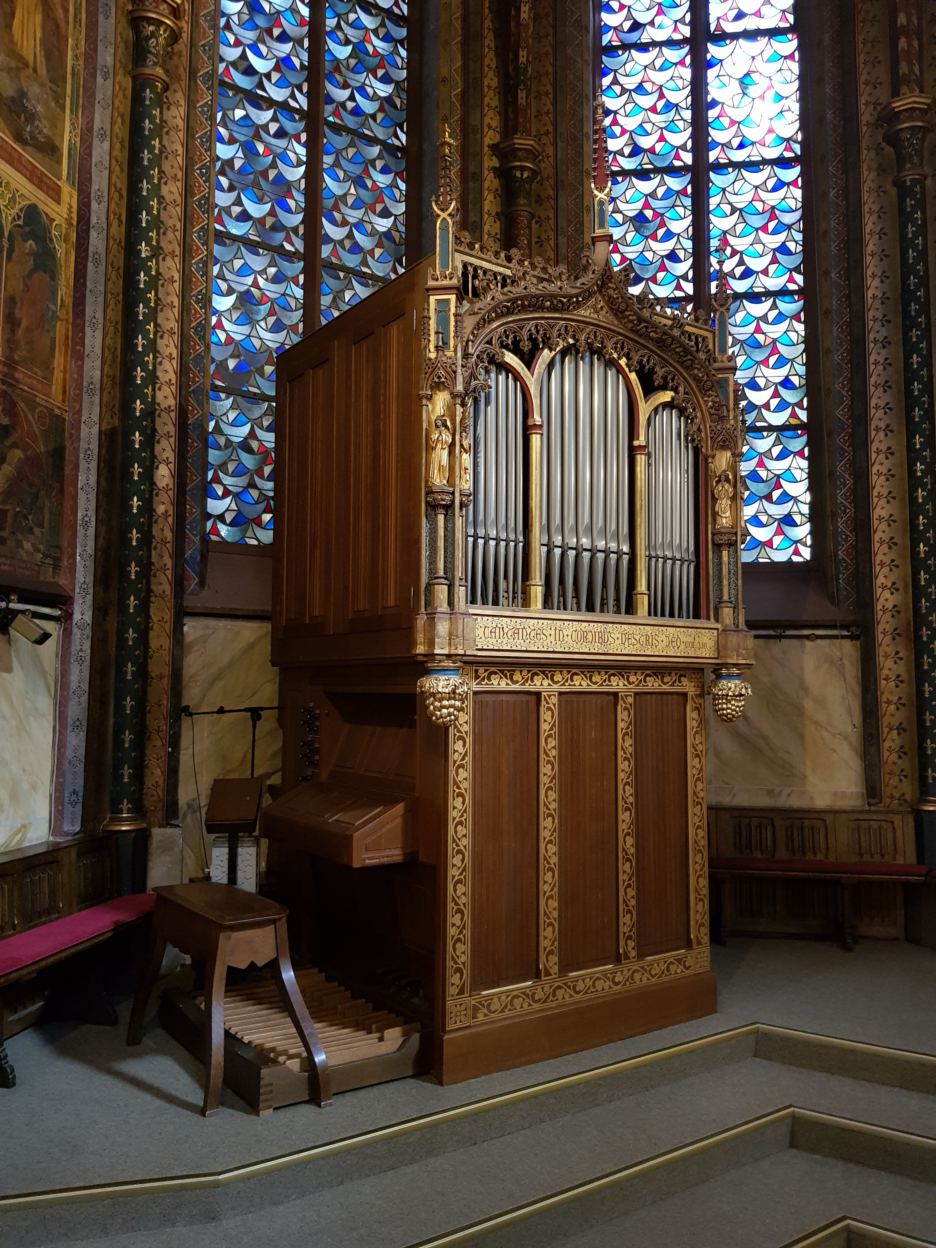 Chor-Orgel in der Basilika St. Marien in Kevelaer, Kapellenplatz 35. This image shows a heritage building in Germany, located in the North Rhine-Westphalian city Kevelaer (no. A 12).